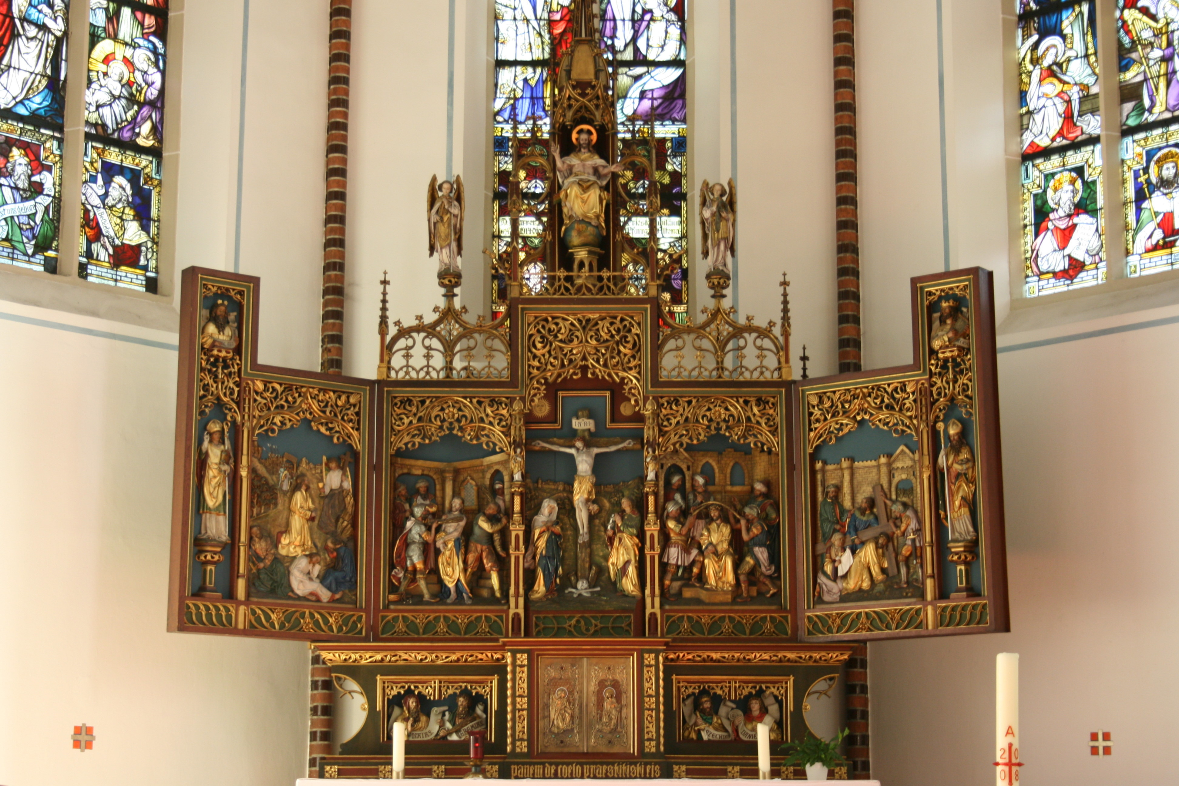 Sankt Matthäus in Altena